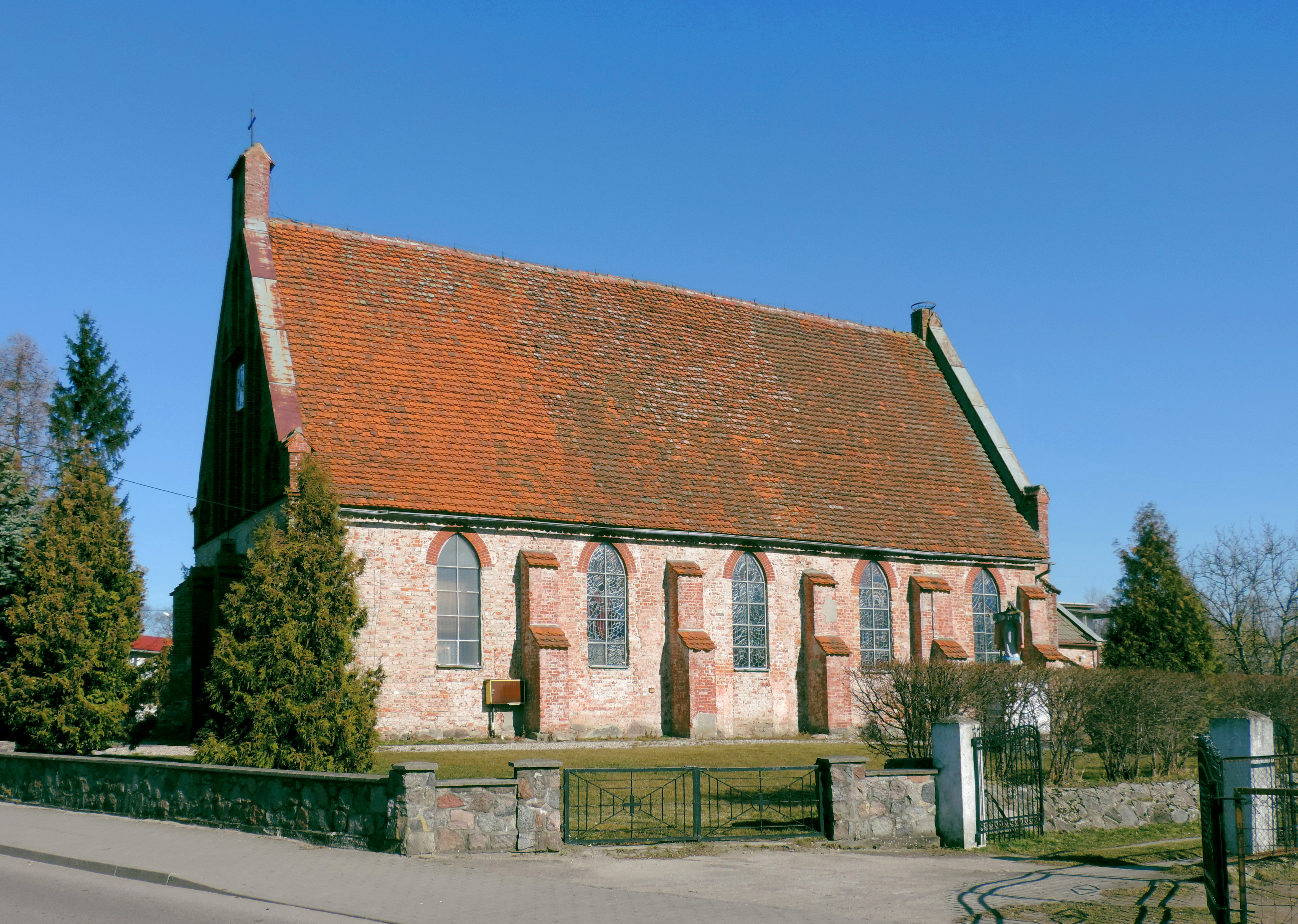 Kościół Matki Bożej Gromnicznej w Malechowie, gm. Malechowo